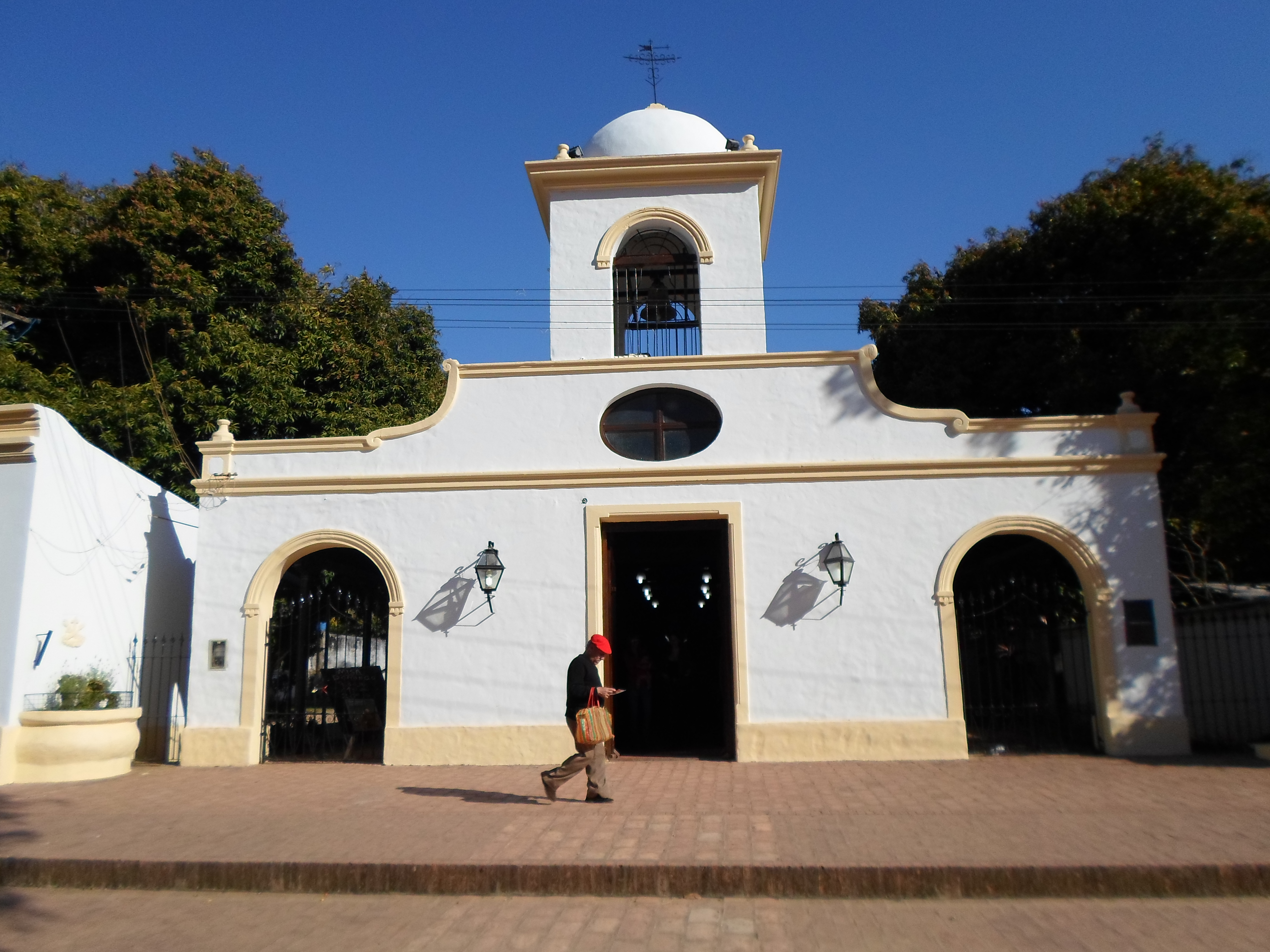 Localidad: Santa Ana de los Guácaras, Departamento San Cosme, Provincia de Corrientes, Argentina.